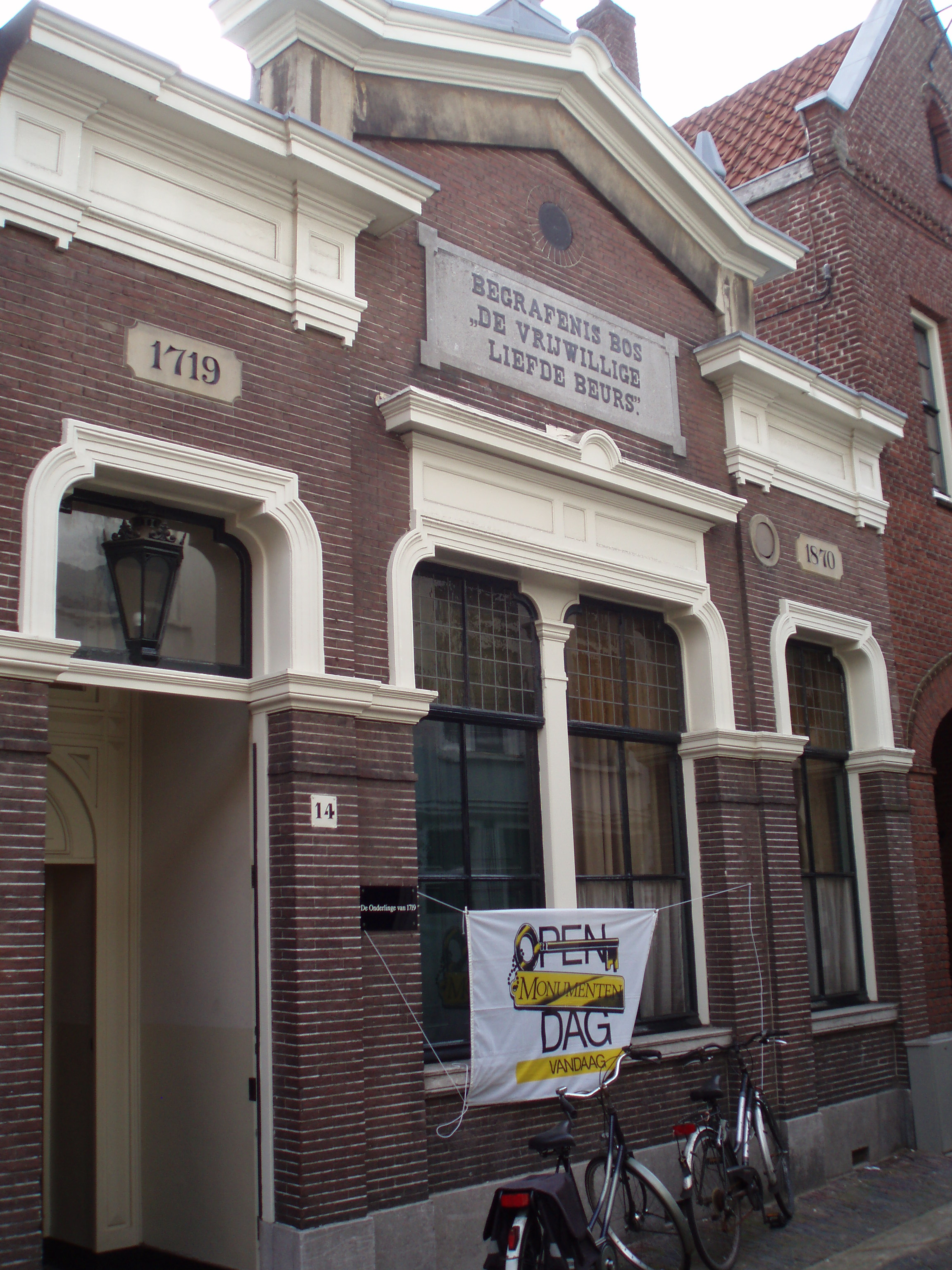 Begrafenis Bos - De Vrijwillige